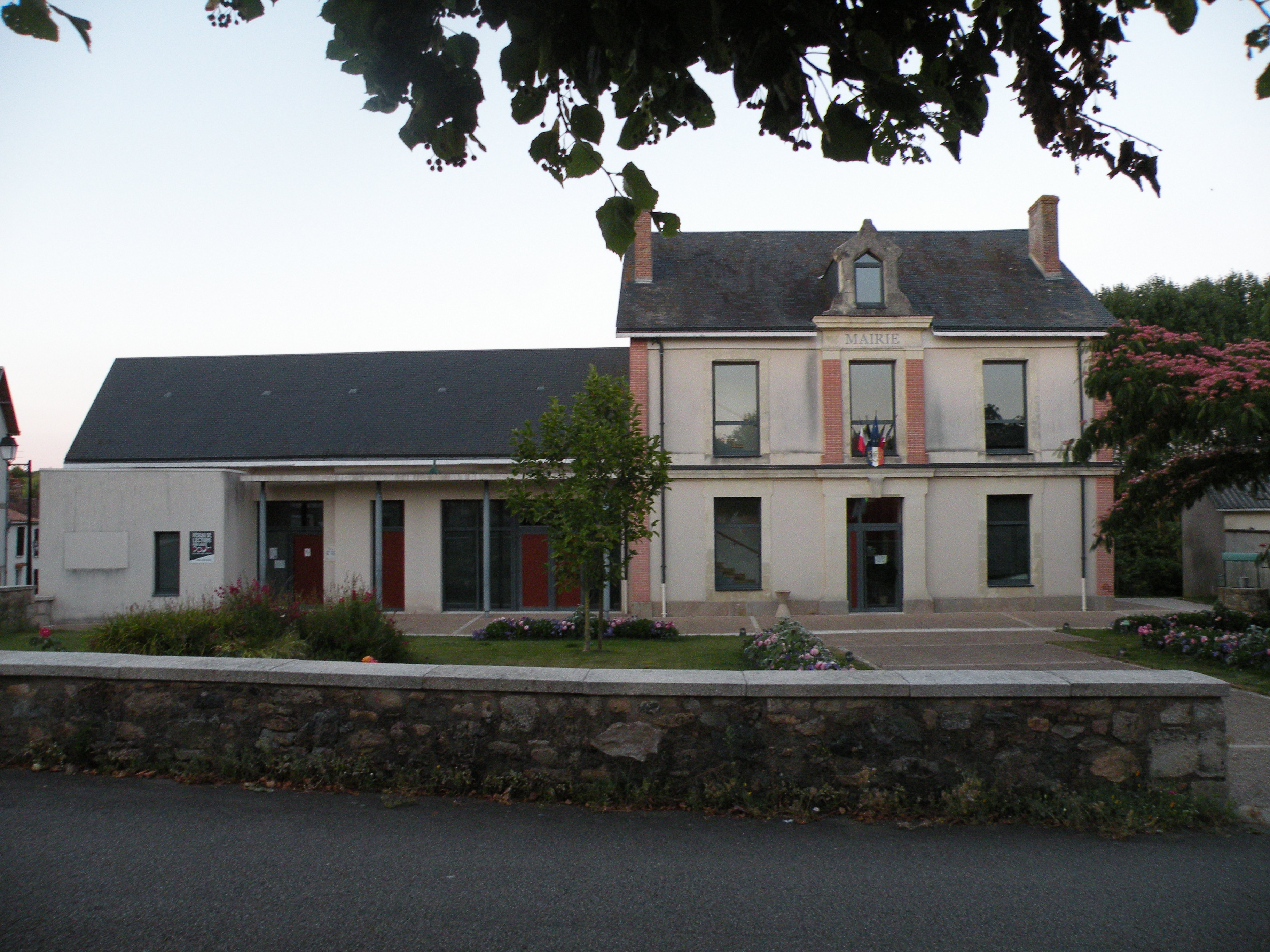 Boismé